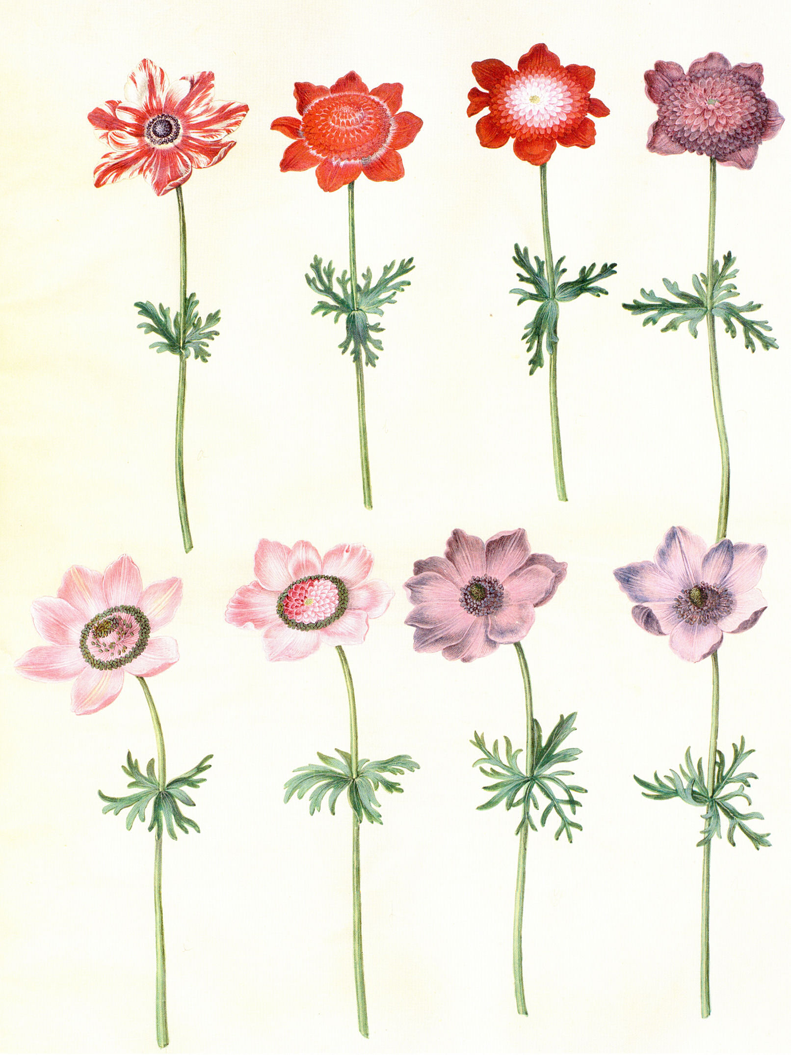 Anemone coronaria, gouache on vellum, in: Gottorfer Codex